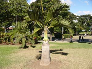 Jardines Hotel Melia Santiago, Santiago de Cuba